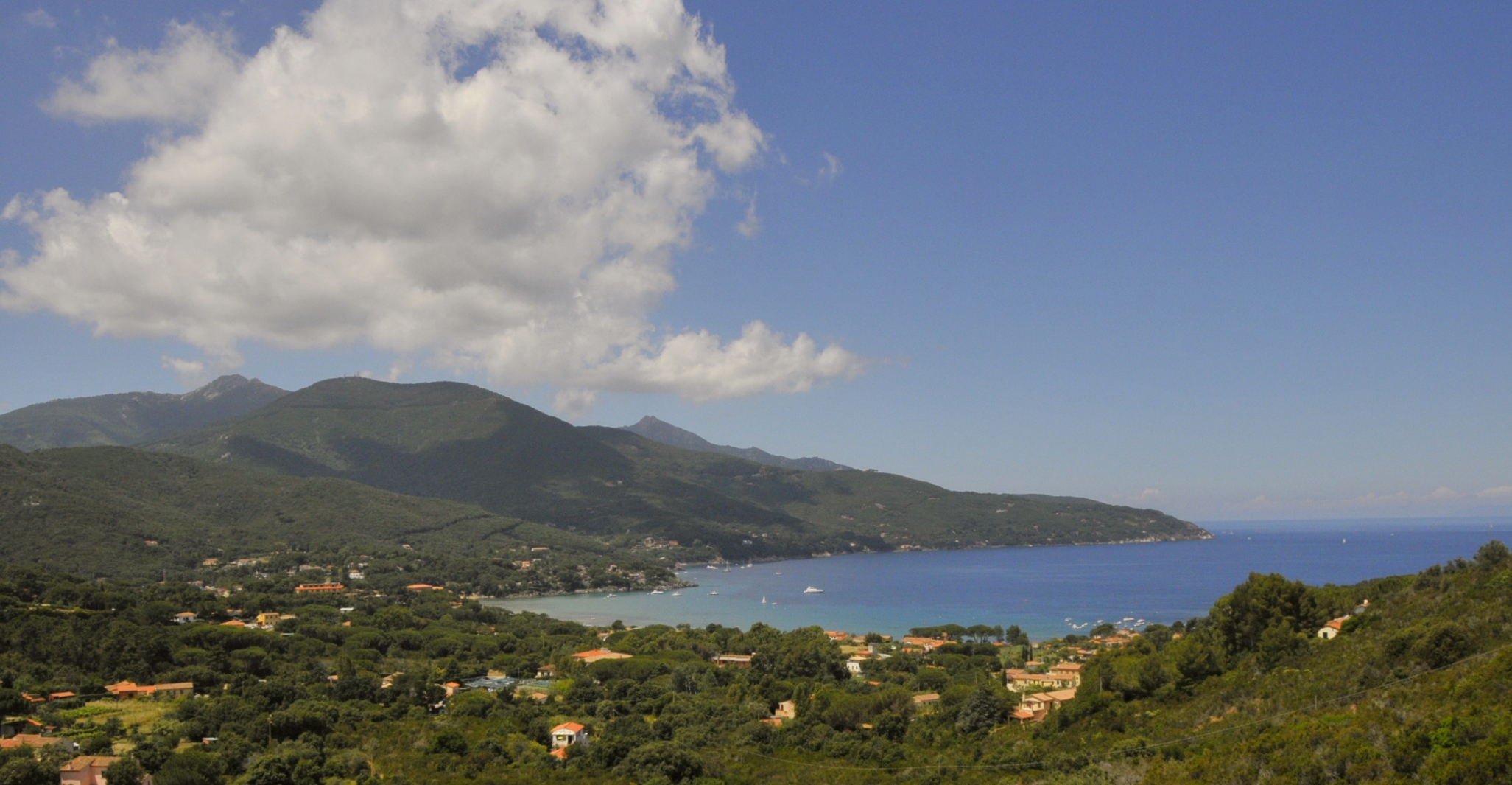 Elba, Marciana, Golfo di Procchio